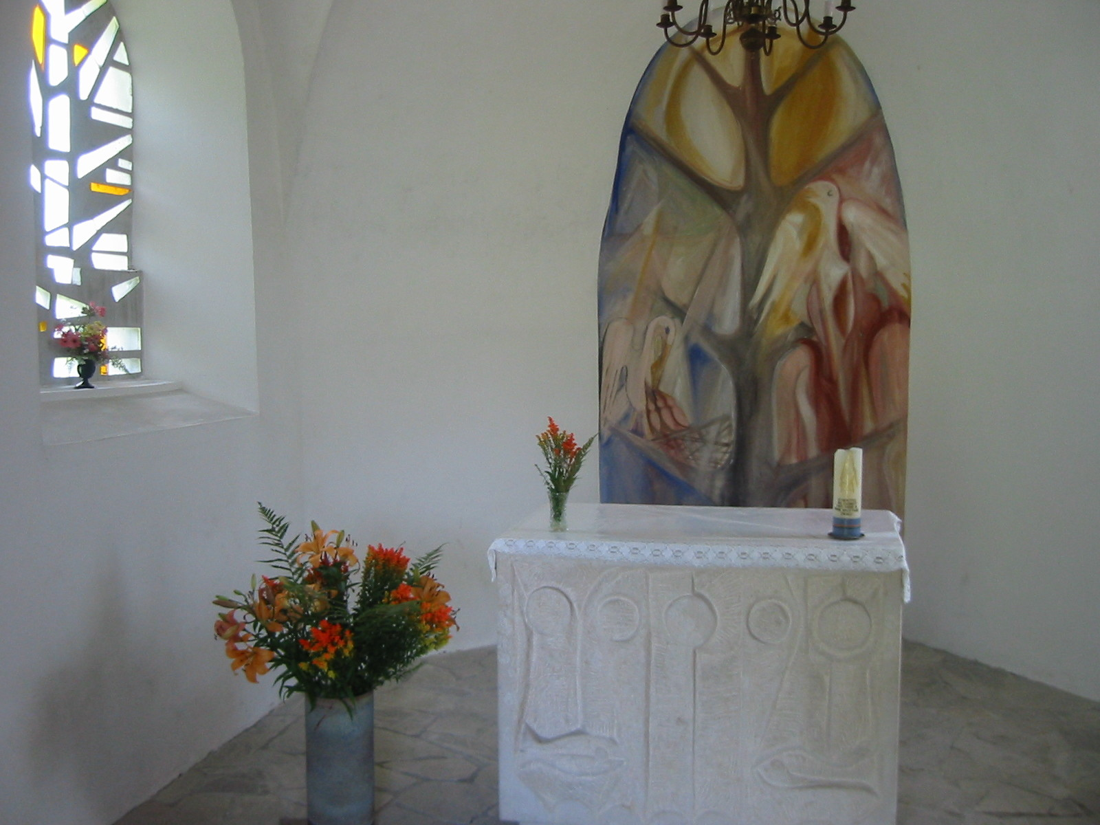 Osterkircherl in St. Aegyd am Neuwalde Innenraum, Wandmalerei Osterbild mit Pelikan und Phönix hinter dem Altar von Robert Herfert